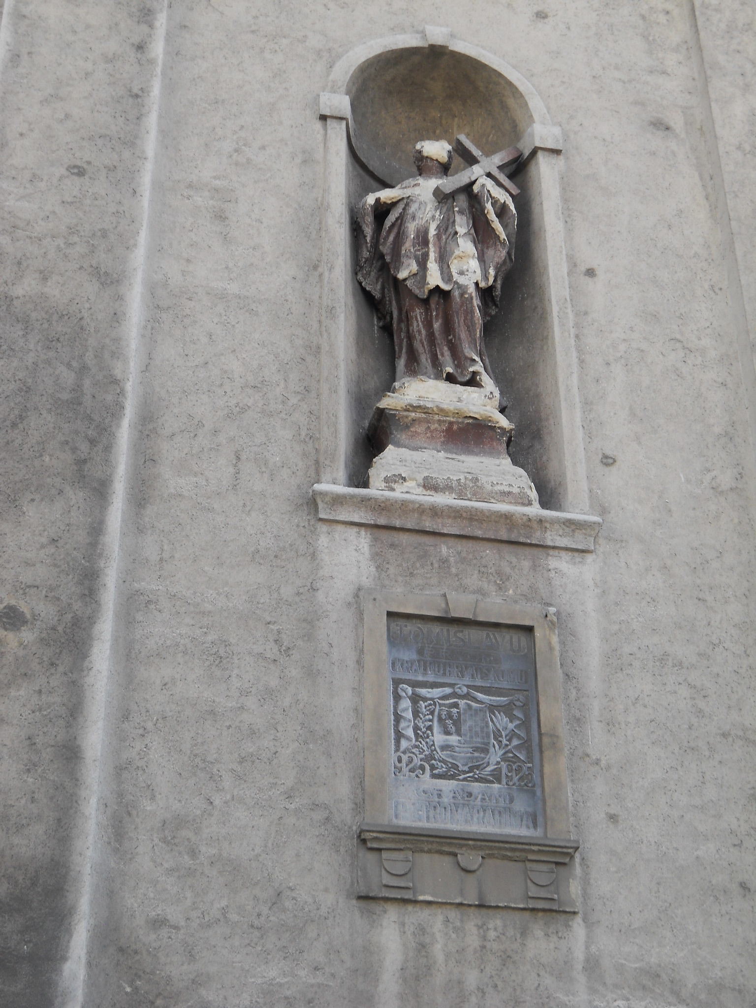 Pétervárad - Szent György-templom - részlet